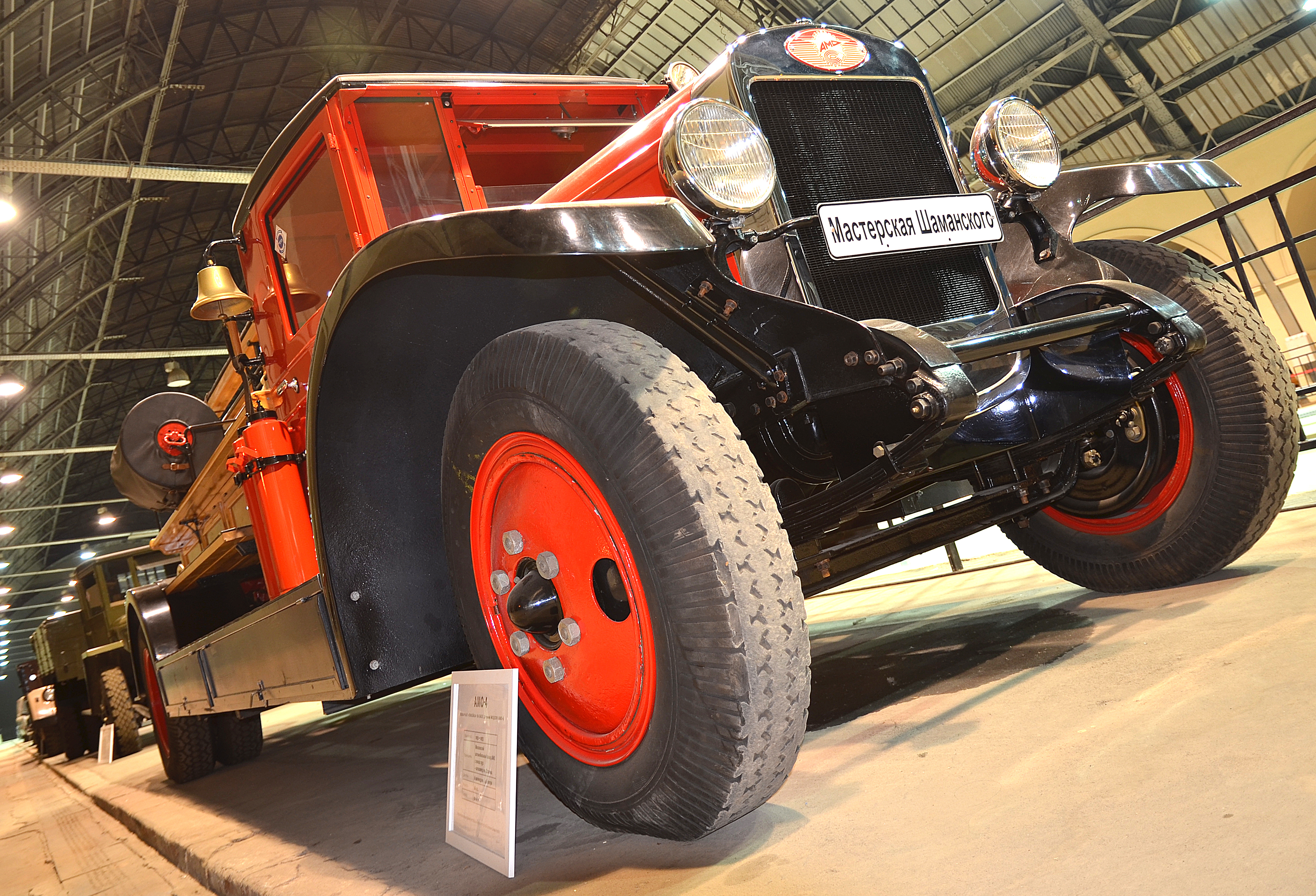 Можно увидеть здесь : You can see here